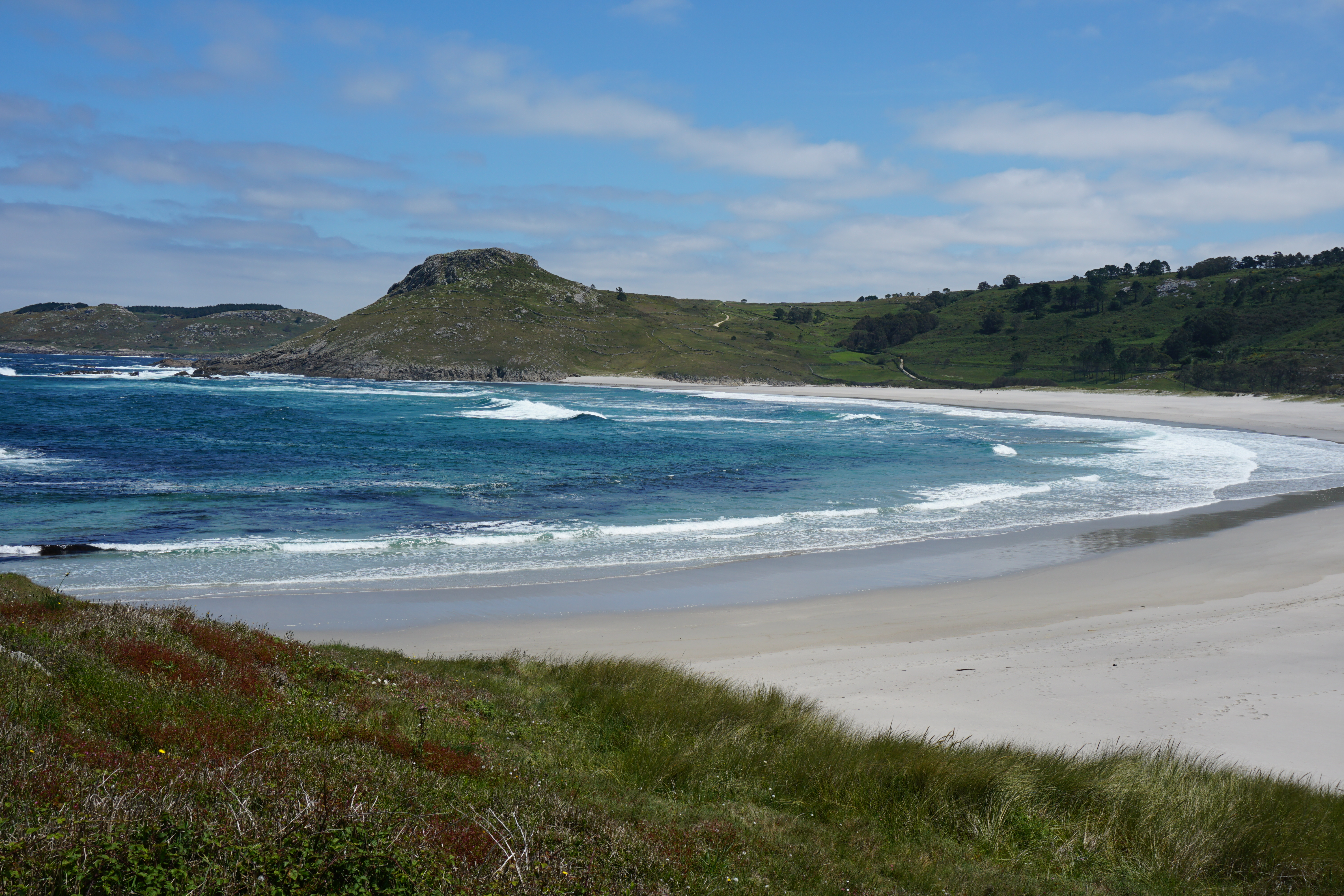 Costa da Morte This is a photography of a Special Area of Conservation in Spain with the ID: ES1110005. Natura2000 entry, EEA entry